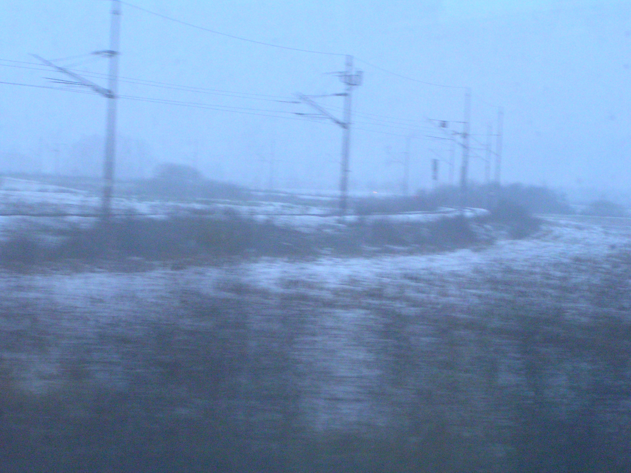 Paneuropean koridor 5 split from Koridor 10 towards Slavonski Šamac (taken at speed above 100 km/h) near Vrpolje